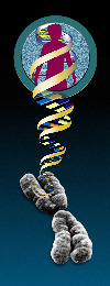 פרוייקט הגנום האנושי שימוש חופשי ניתן לתמונות של U.S. Department of Energy Human Genome Program or U.S. Department of Energy Genomics:GTL Program and